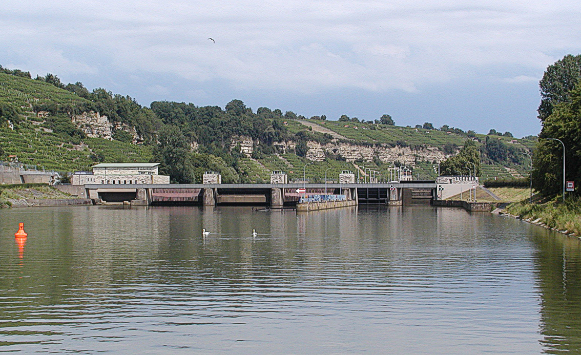 Die Neckarschleuse Poppenweiler